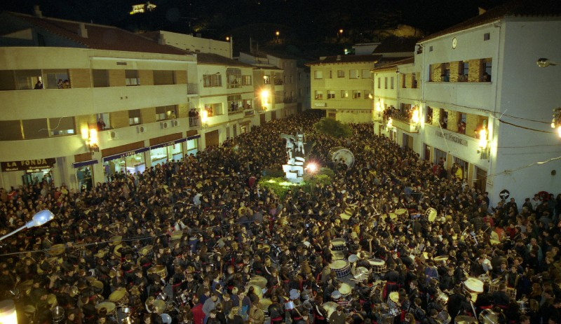 procesion andorra semana santa